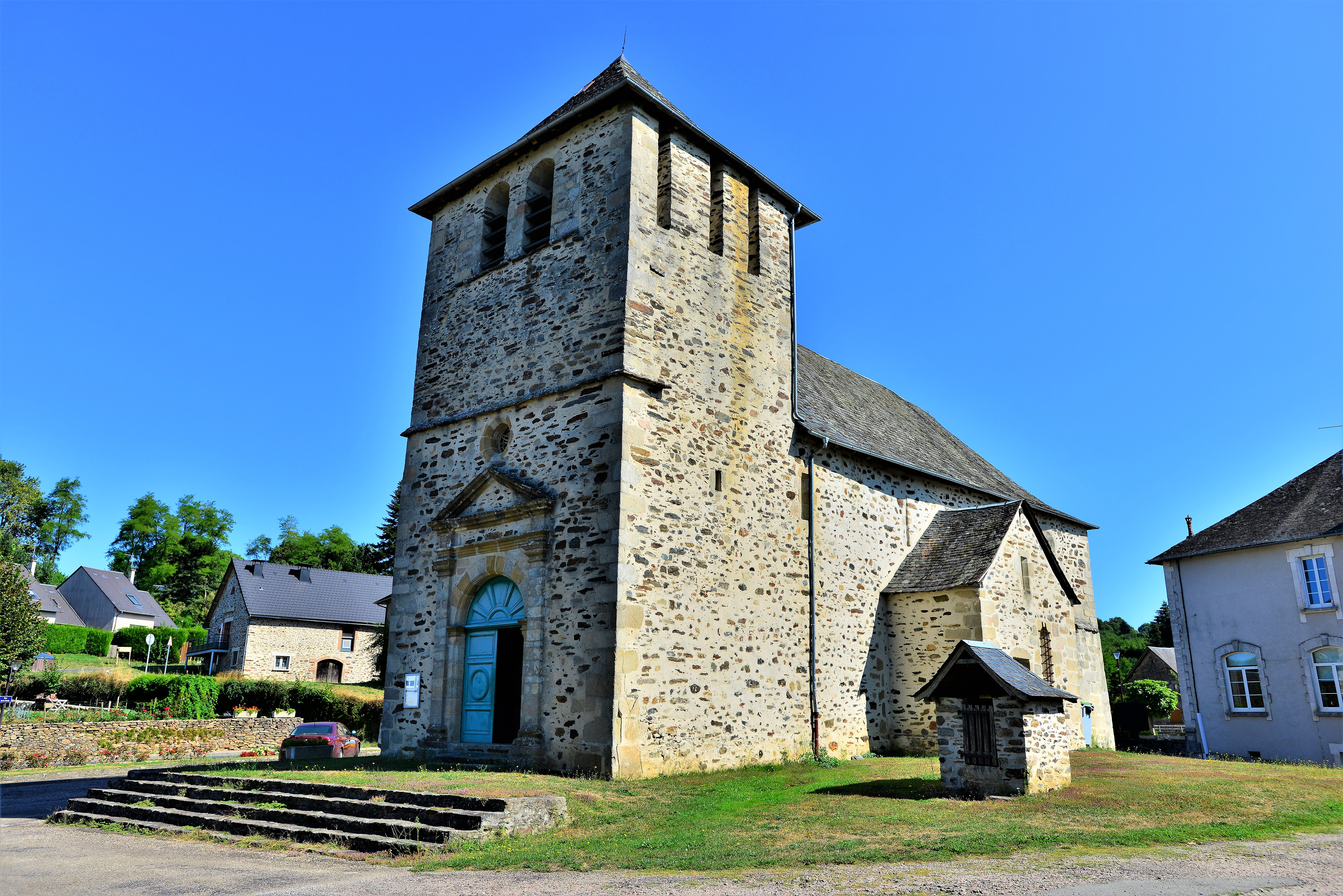 L'église de Saint Clément, Corrèze, France.